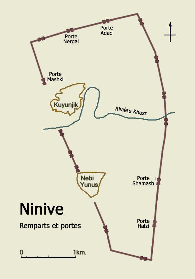 Francisation du fichier "Nineveh_map_city_walls_&_gates.JPG"